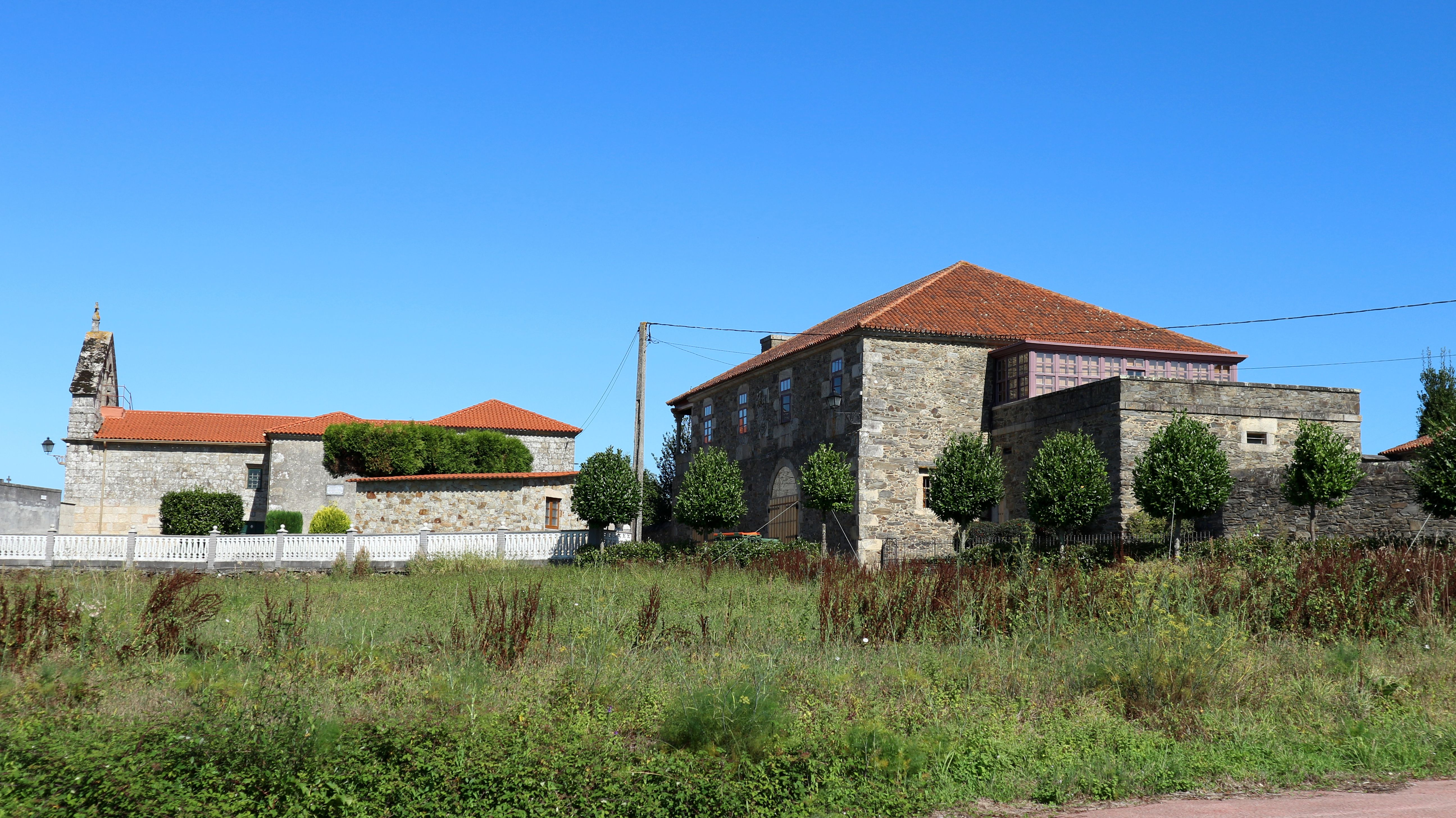 Igrexa de Santo Estevo e Pazo de Piadela, Betanzos.